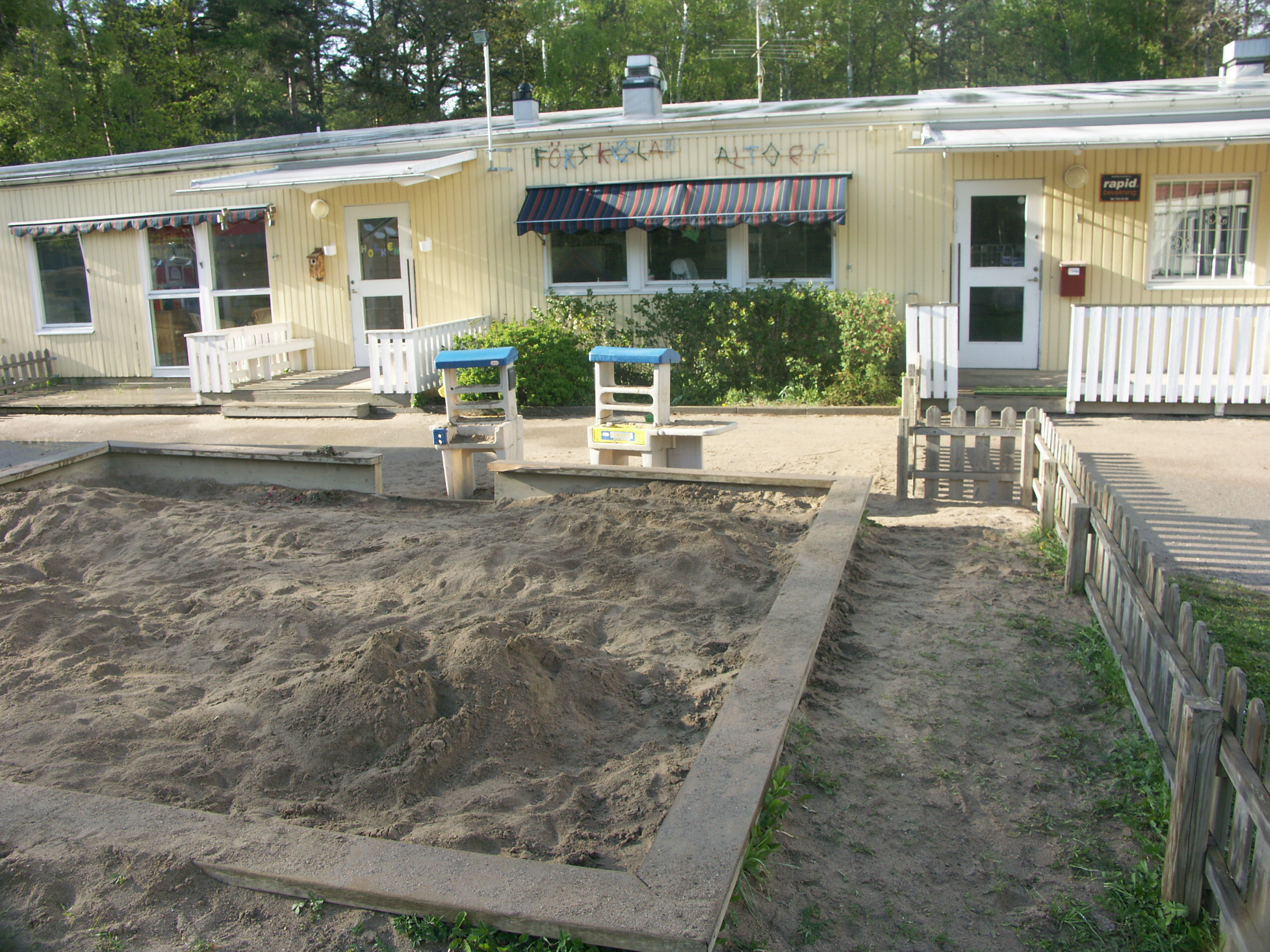 Bild utanför Förskolan Altorp